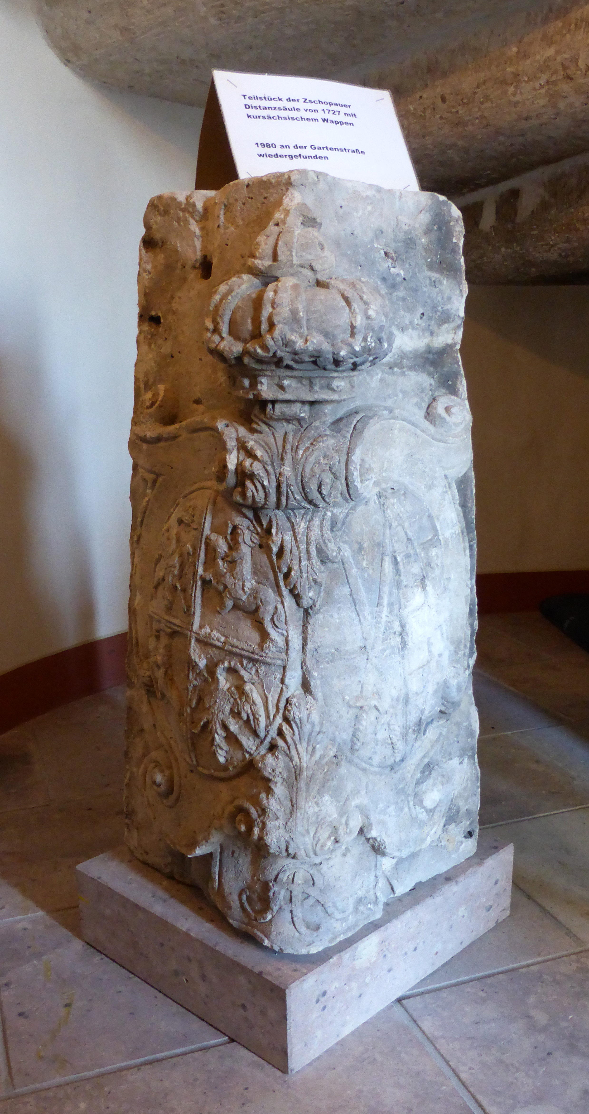 Fragment der Zschopauer-Distanzsäule von 1727 mit kursächsischem Wappen. 1980 an der Gartenstraße wiedergefunden. Ausgestellt im Schloss Wildeck, Zschopau - Sachsen.